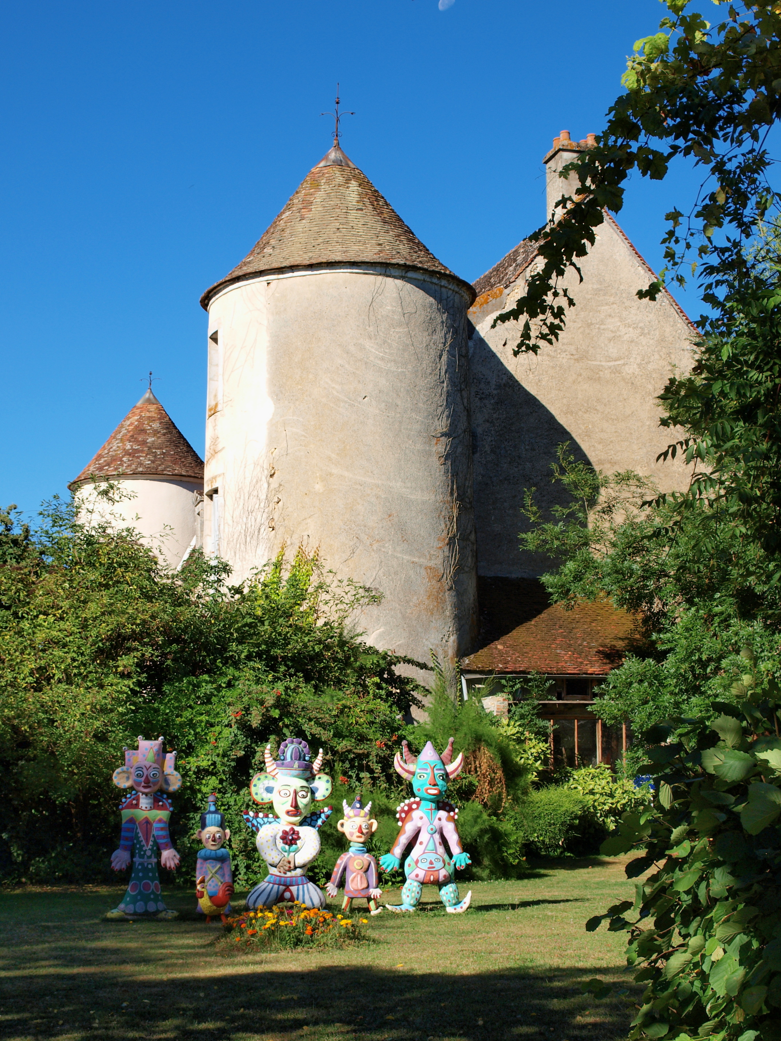 Fontenoy-en-Puisaye (Yonne, France)